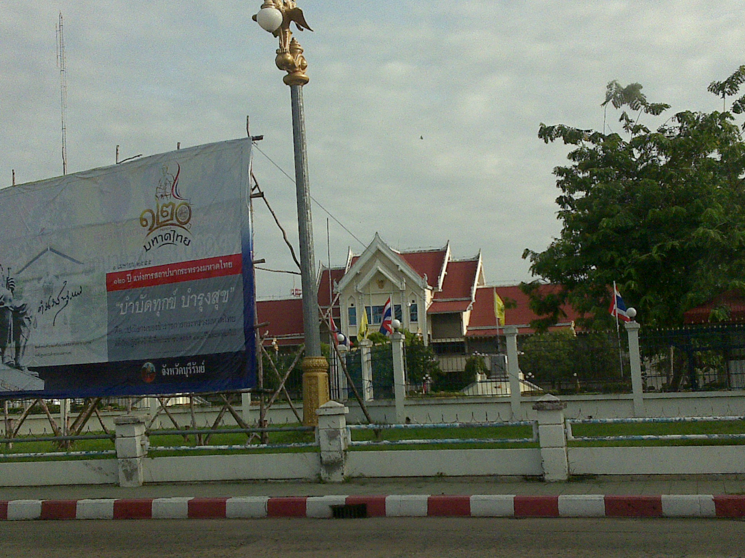 Buriram Town Hall, Thailand